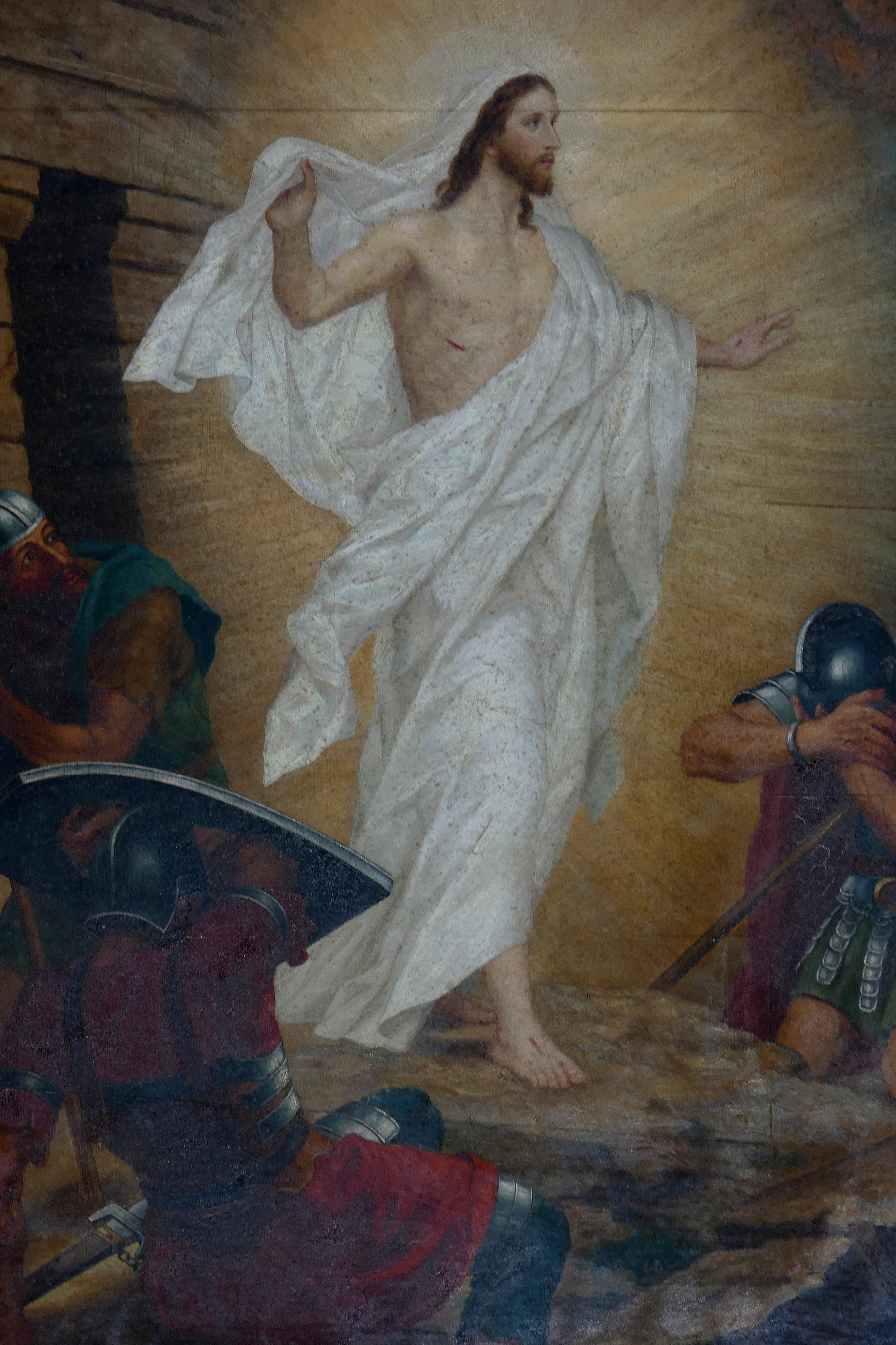 Alsace, Bas-Rhin, Église Saint-Étienne de Bilwisheim (IA00119125).Maître-autel néo-baroque (1912): tableau "Résurrection du Christ"